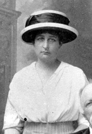 D. Maria Pia de Bourbon, esposa de D. Luís de Orléans e Bragança.